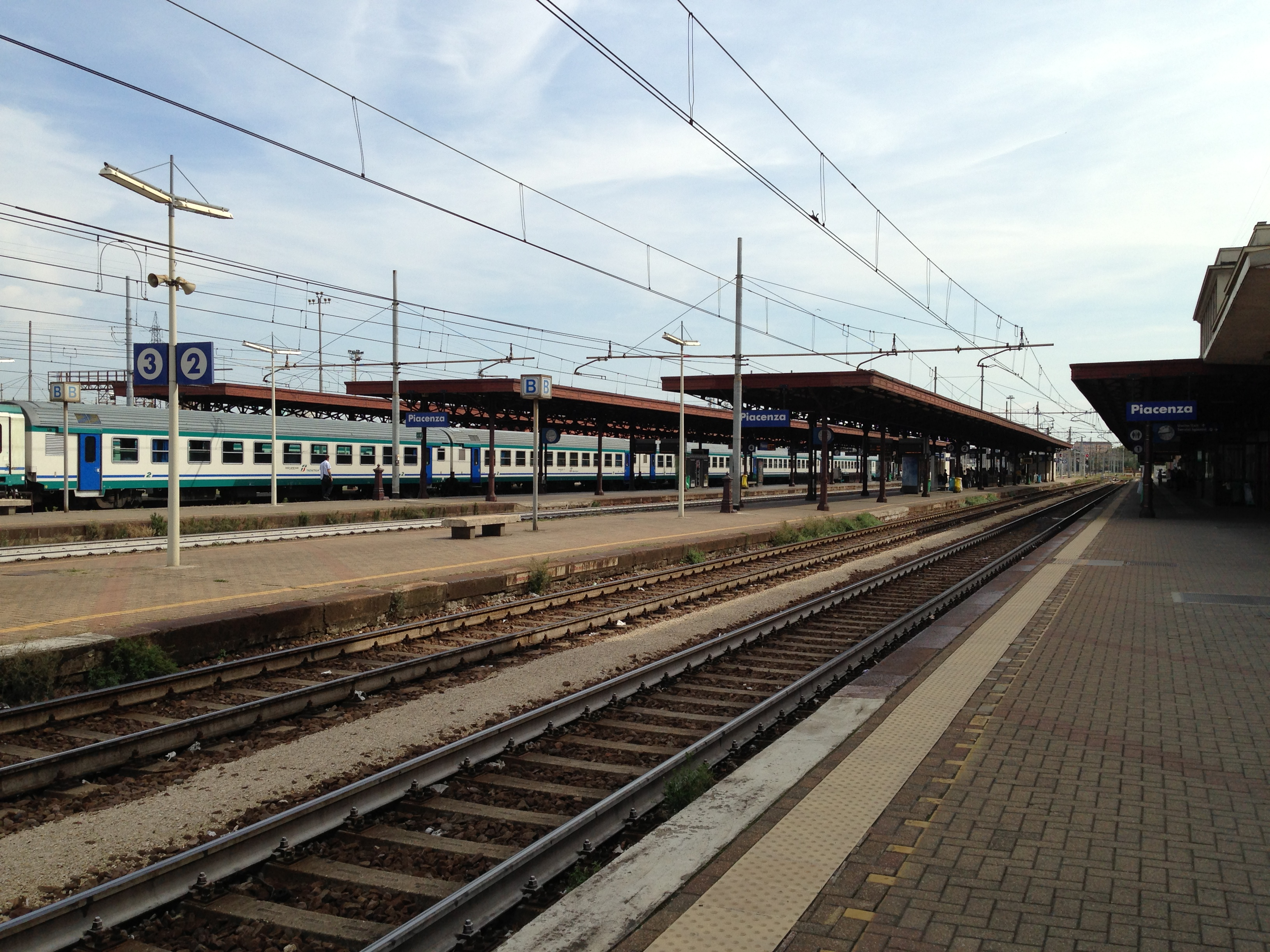 Piazzale binari della stazione di Piacenza